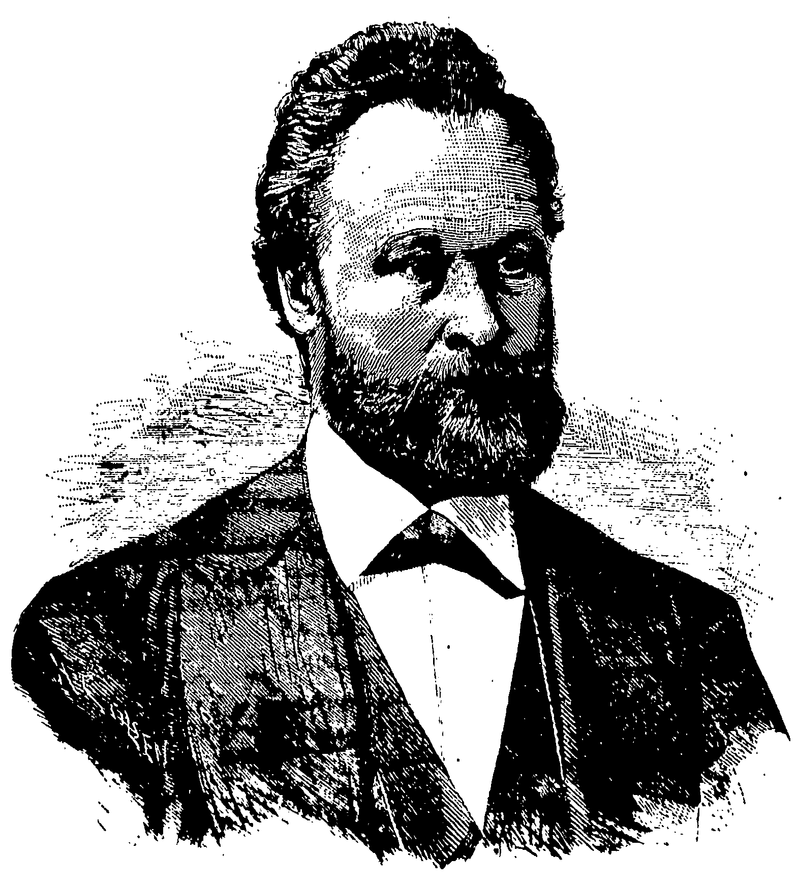 Stortingsmann, kirkesanger i Hornindal Knut Rasmussen Kirhorn.